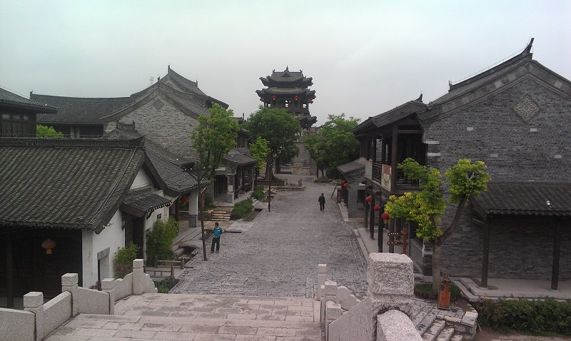 运河古城坐落于枣庄市辖区台儿庄区，既是民族精神的象征、历史的丰碑，也是运河文化的承载体，至今仍保留有不少的遗存，被世界旅游组织誉为“活着的运河”、“京杭运河仅存的遗产村庄”。